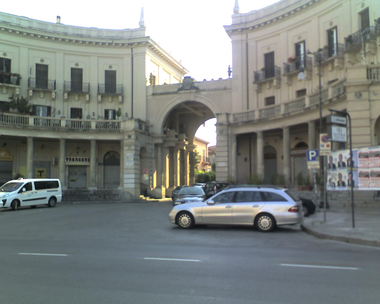 sono l'autore rilascio tutti i diritti